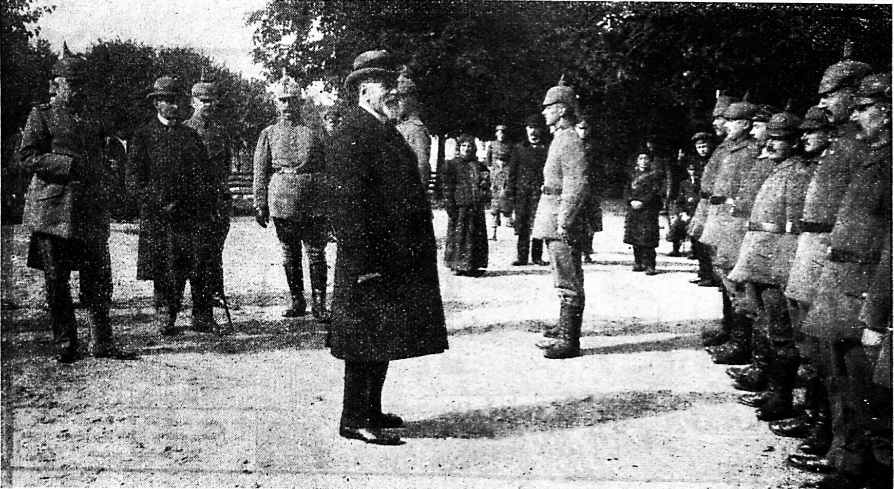 Ansprache an Lübecker Landeskinder im Schloßgarten zu Wilna.